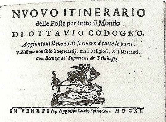 Titelblatt des auf Giovanni da l’Herba beruhenden Postreisebuchs von Ottavio Codogno „Nuovo itinerario delle Poste per tutto il mondo“ aus dem Jahr 1611